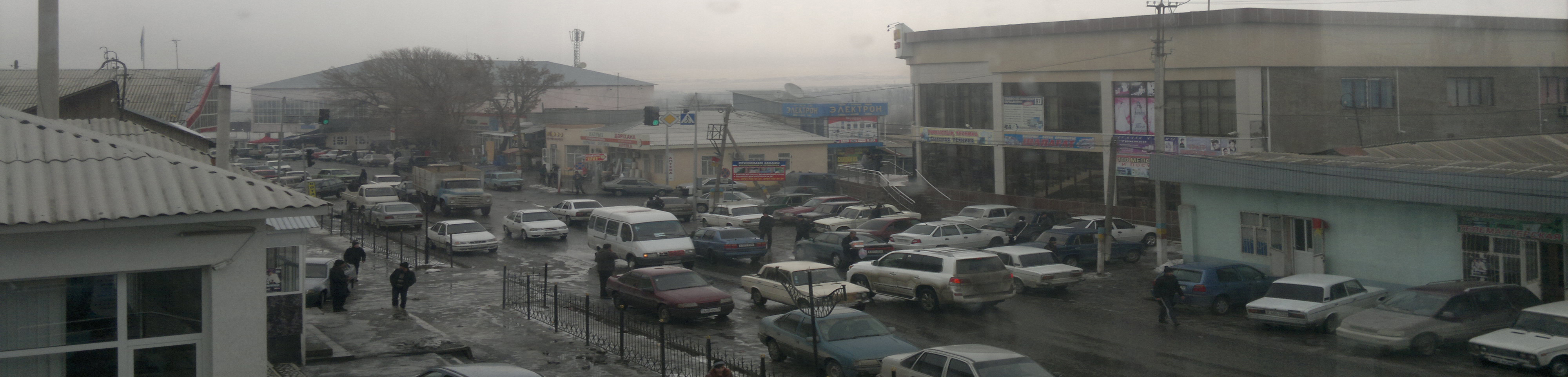 Oʻzbekcha/ўзбекча: panarama